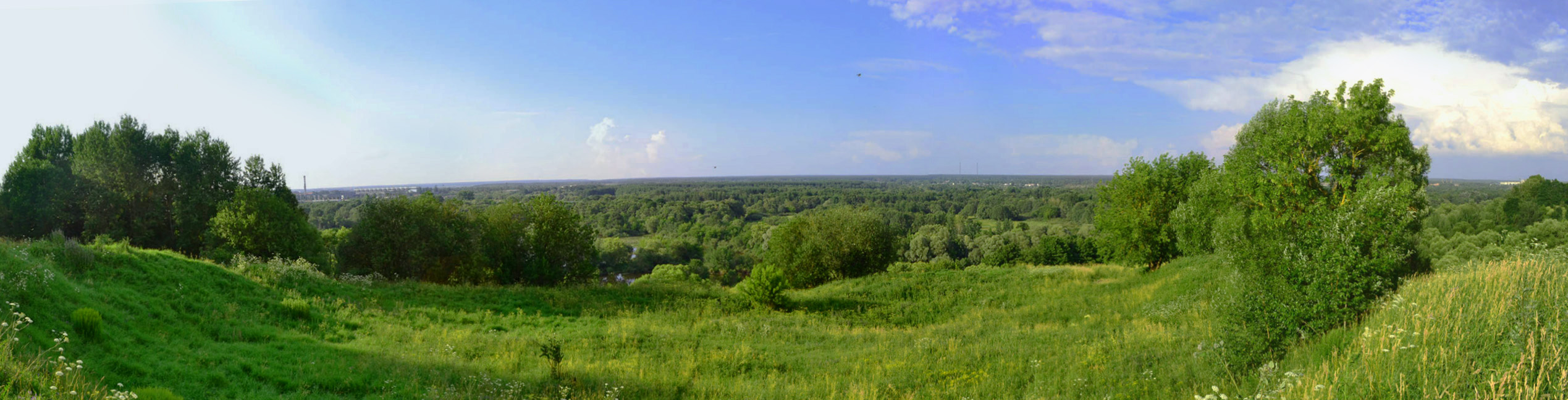 Место основания города Брянск - Чашин курган. Лето 2013